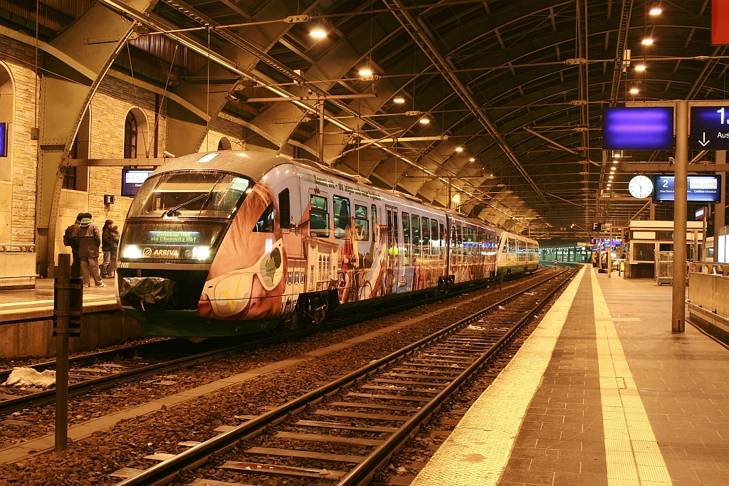 Vogtland-Express im Berliner Ostbahnhof